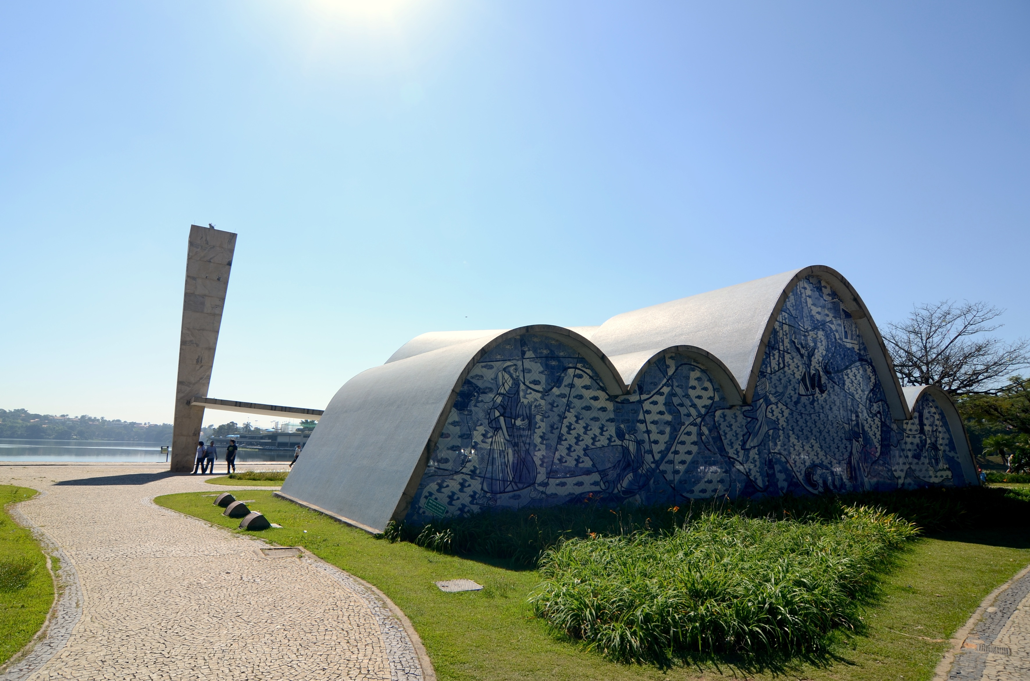 Igreja de São Francisco de Assis